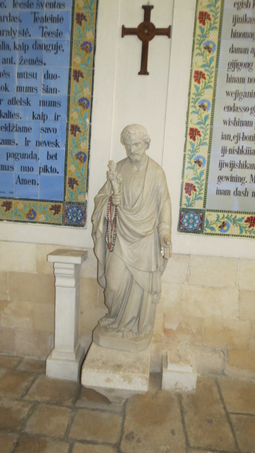 Church of the Pater Noster Roman Catholic church located on the Mount of Olives in Jerusalem Church of Eleona כנסיית אבינו שבשמים